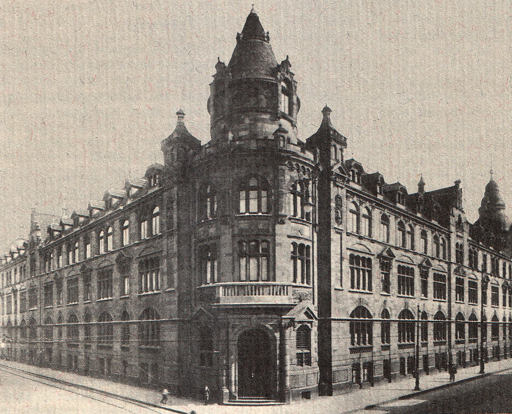 LVA Rheinprovinz, Eingang Friedrichstraße Ecke Adersstraße, nach 1900. Bildunterschrift: Die „Klebekiste“ [Landesversicherungsanstalt Rheinprovinz] nach der Jahrhundertwende.: Der Fotograf stand direkt vor dem Eingang an der Friedrichstaße (rechs) und Adersstraße; am Ende beider Fronten sind die nach 1900 erfolgten Anbauten zu erkennen.